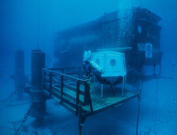 NOAA AquaLab Aquarius